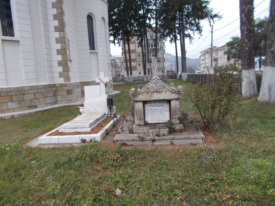 Biserica Sf. Gheorghe din Pucioasa vedere laterală